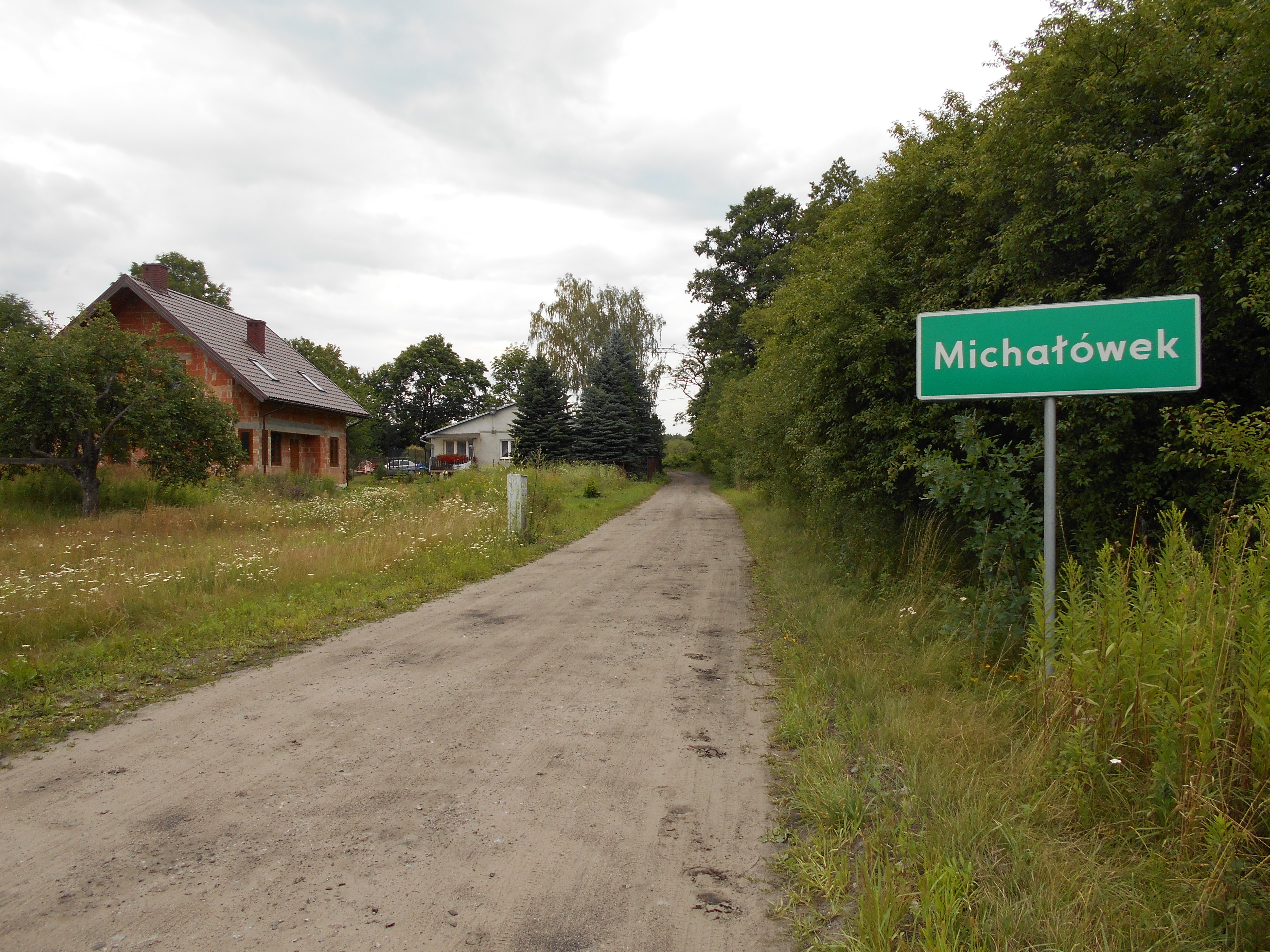 Miejscowość w gminie Wiązowna